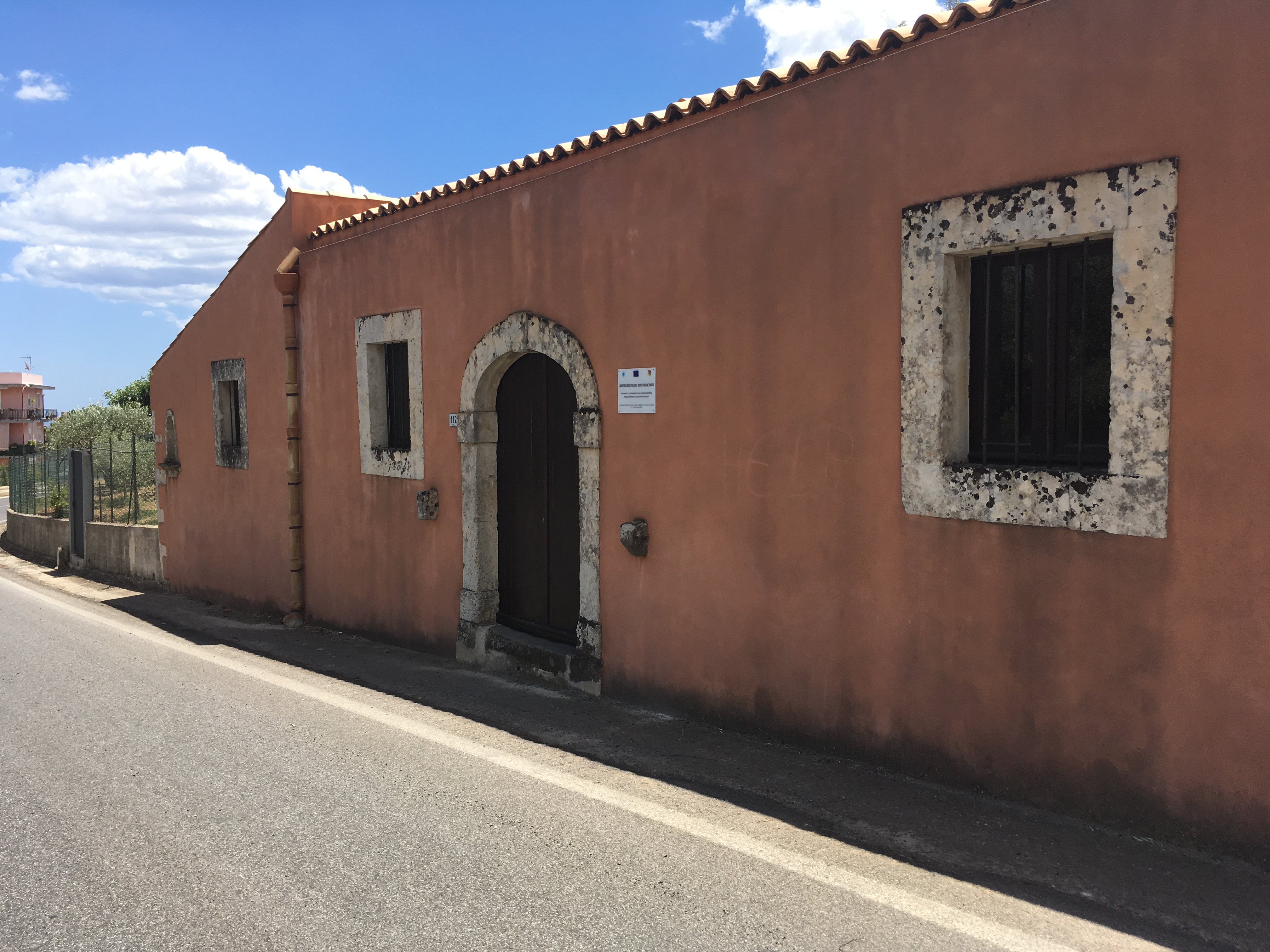 Ingresso Museo etnoantropologico, via Piave 112 all'uscita ovest di Solarino, SS 124 in direzione Palazzolo A.